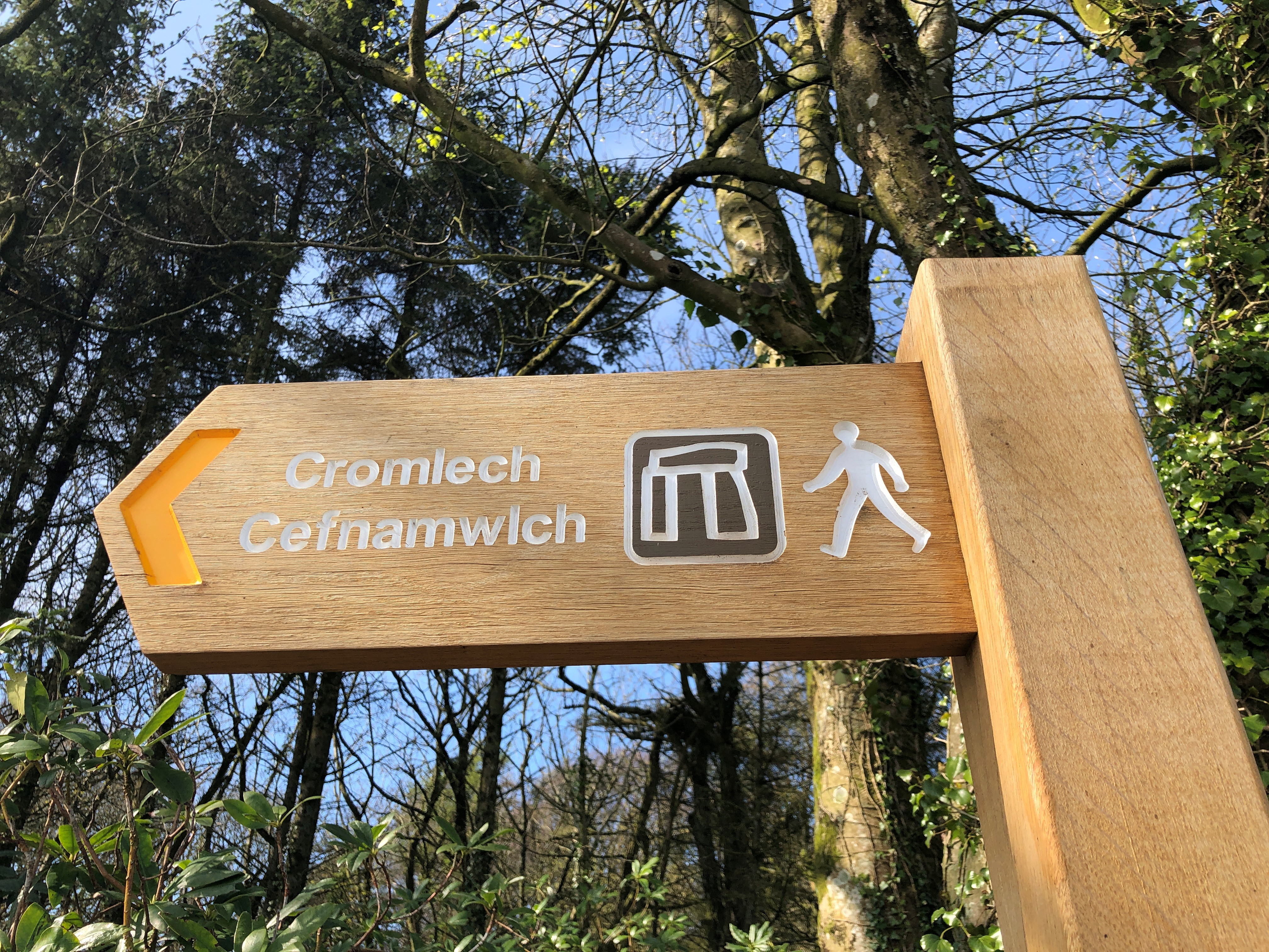 Arwydd yn dynodi'r ffordd tuag at y gromlech o Lon Trigwm.